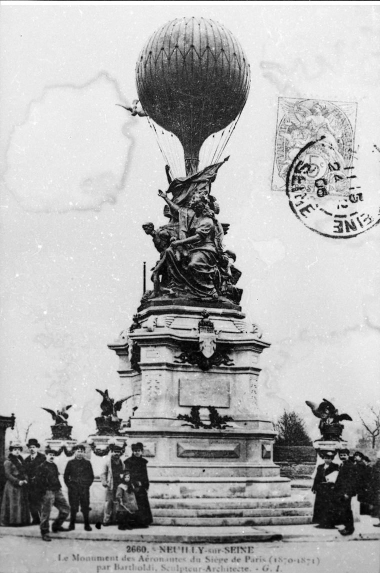 Le monument du ballon de la porte des ternes œuvre de Bartholdi vers 1910.